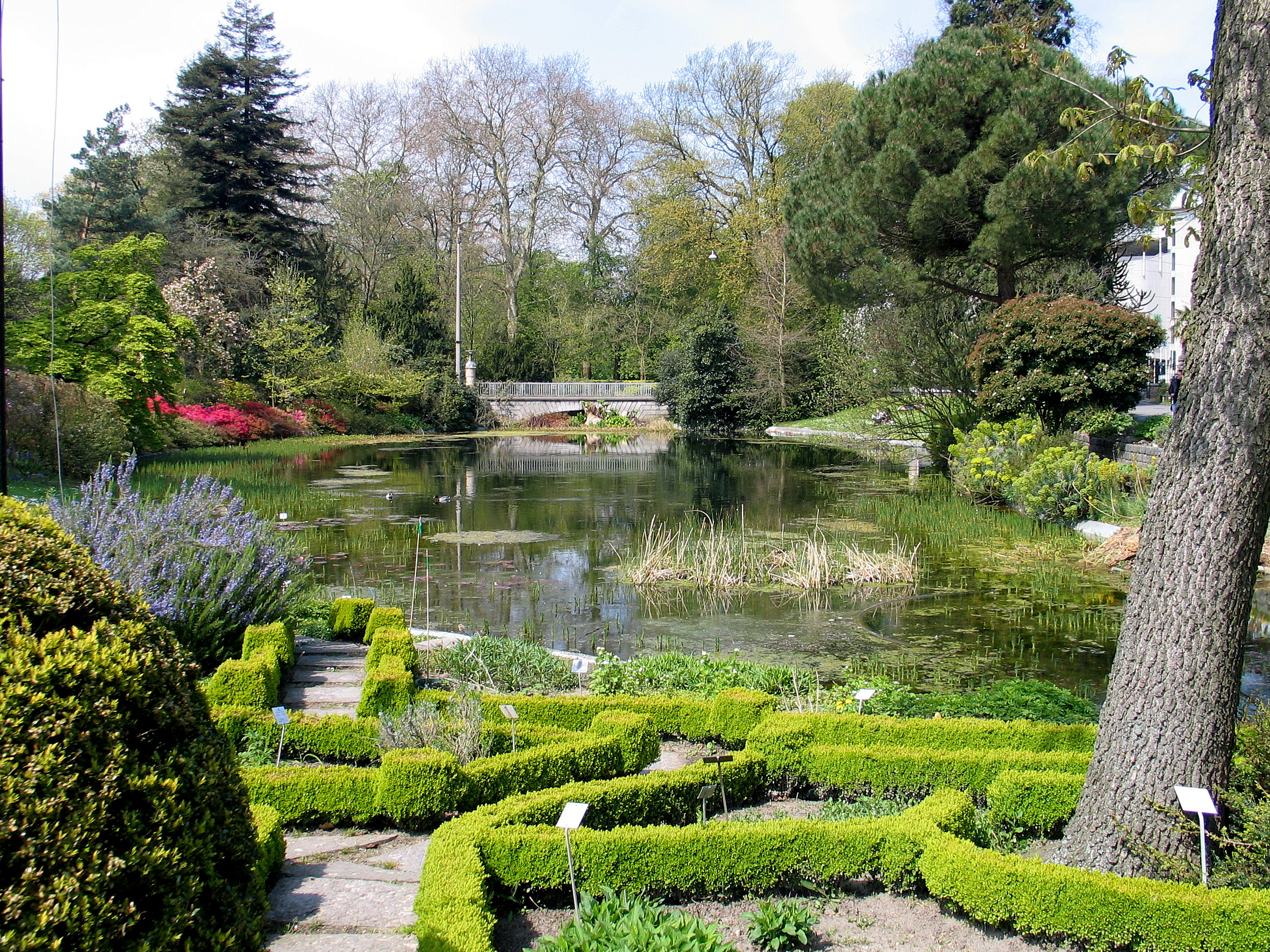 Plantentuin te Gent, België